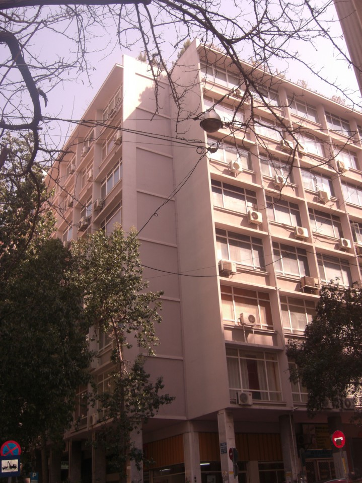 Ινστιτούτο Πούσκιν Αθηνών - εξωτερικό κτίριο